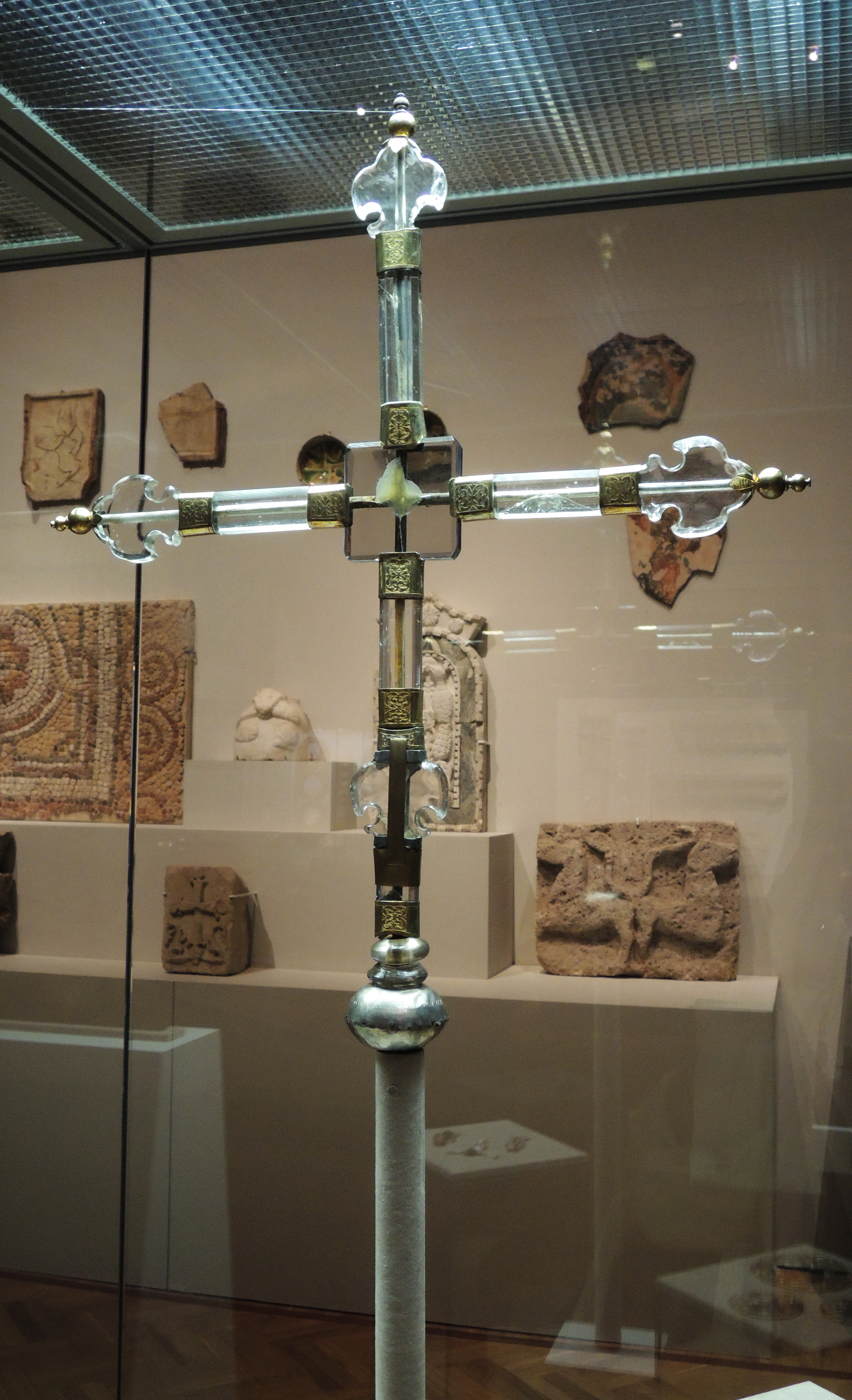 Крест выносной Корсунский. Западная Европа, 15 (?) век. Серебряные обкладки - Россия, 16-17 вв. ММК.